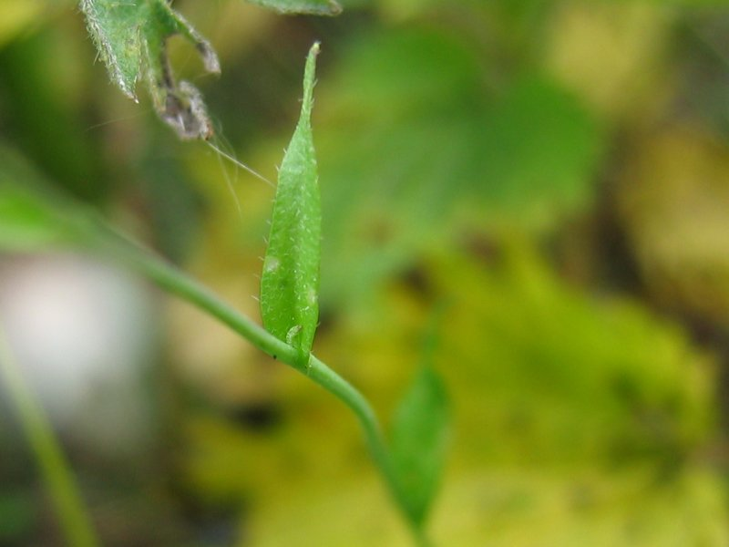 Blatt des Hirtentäschelkrautes Capsella bursa-pastoris